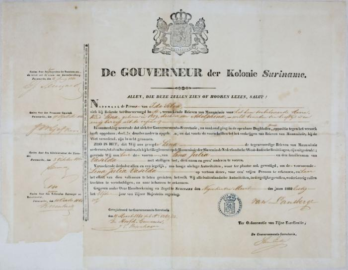 Document. Vrijlatingsbrief d.d. 19-03-1860 uitgegeven door gouverneur van Lansberge, en aangevraagd door I. da Silva voor "het in zijn bezit zijnde slavenkind Lina", in 1859 geboren als dochter van Adolphina, en "welk beneden den leeftijd is om enig beroep uit te oefenen". In deze brief wordt haar de naam Lina Julia Vasilda gegeven. Een manumissie is het onder bepaalde voorwaarden vrijlaten van slaven vóór de afschaffing van de slavernij in 1863. Oorspronkelijk betrof het afspraken tussen eigenaar en slaaf, maar al gauw probeerde de overheid er grip op te krijgen. De vrijheid van de slaven was aan allerlei voorwaarden gebonden, en als aan een deel daarvan niet werd voldaan, kon hij of zij terug vervallen in slavernij (Encyclopedie Suriname, 1977:392). Voorbeelden van deze beperkingen waren het uitgaansverbod na 21:00 uur, verbod op omgang met slaven, en de plicht hun vroege meesters respect te bewijzen.. Vrijlatingsbrief voor de slavin Lina Julia Vasilda